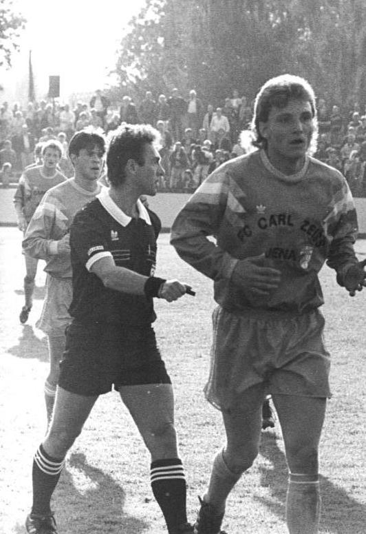 ADN-Friedrich Gahlbeck-29.9.90-Leipzig: Fußball-Oberliga- FC Sachsen Leipzig - FC Carl Zeiss Jena Bei dieser Begegnung gab es überhaupt kein sportliches Endergebnis. Zehn Minuten vor Schluß sah sich Schiedsrichter Kirschen veranlaßt, wegen Zuschauer-Randale die Begegnung beim Stand von 1:1 abzubrechen.